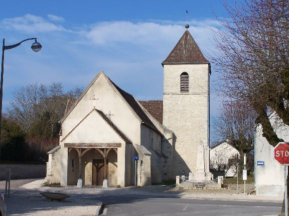 BRETIGNY église côte d'or